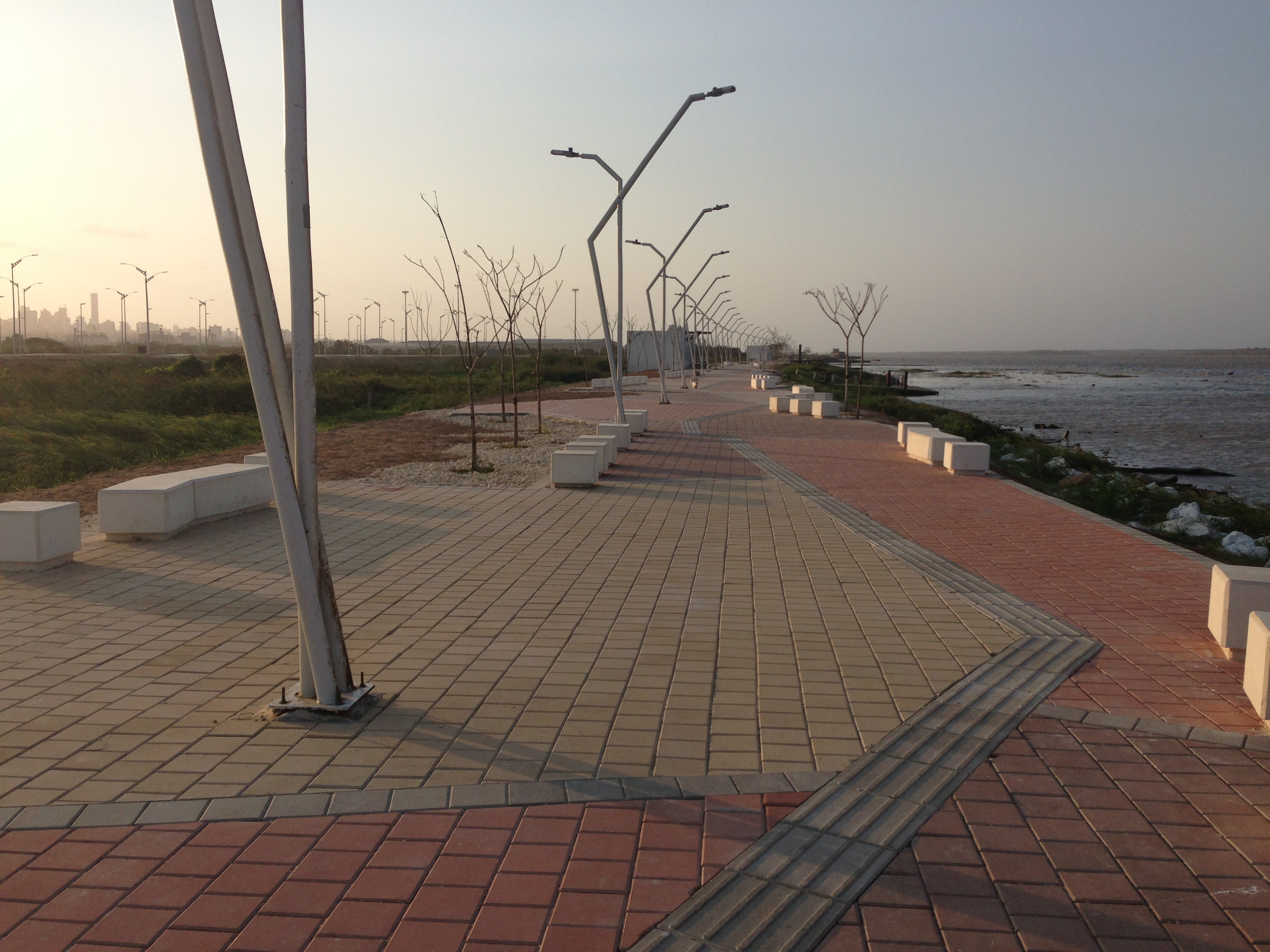 Malecón avenida del Río Barranquilla